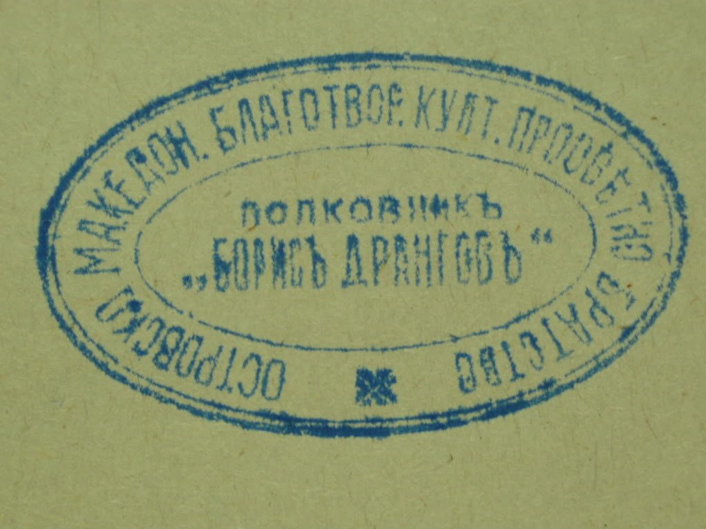 Печат на Островското благотворително братство.